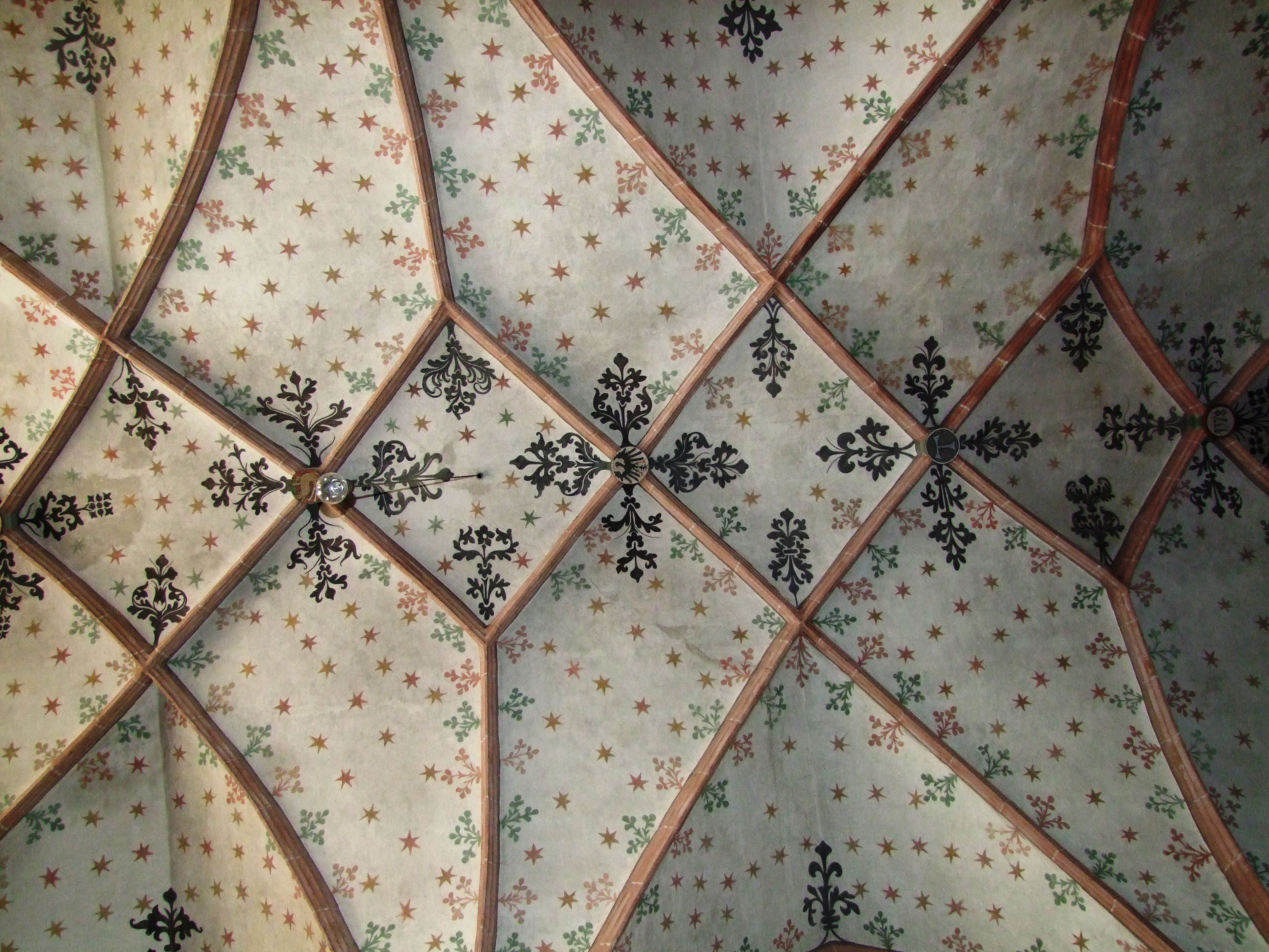 Sternenhimmeldecke des Hauptschiffes der Kinderlehrkirche